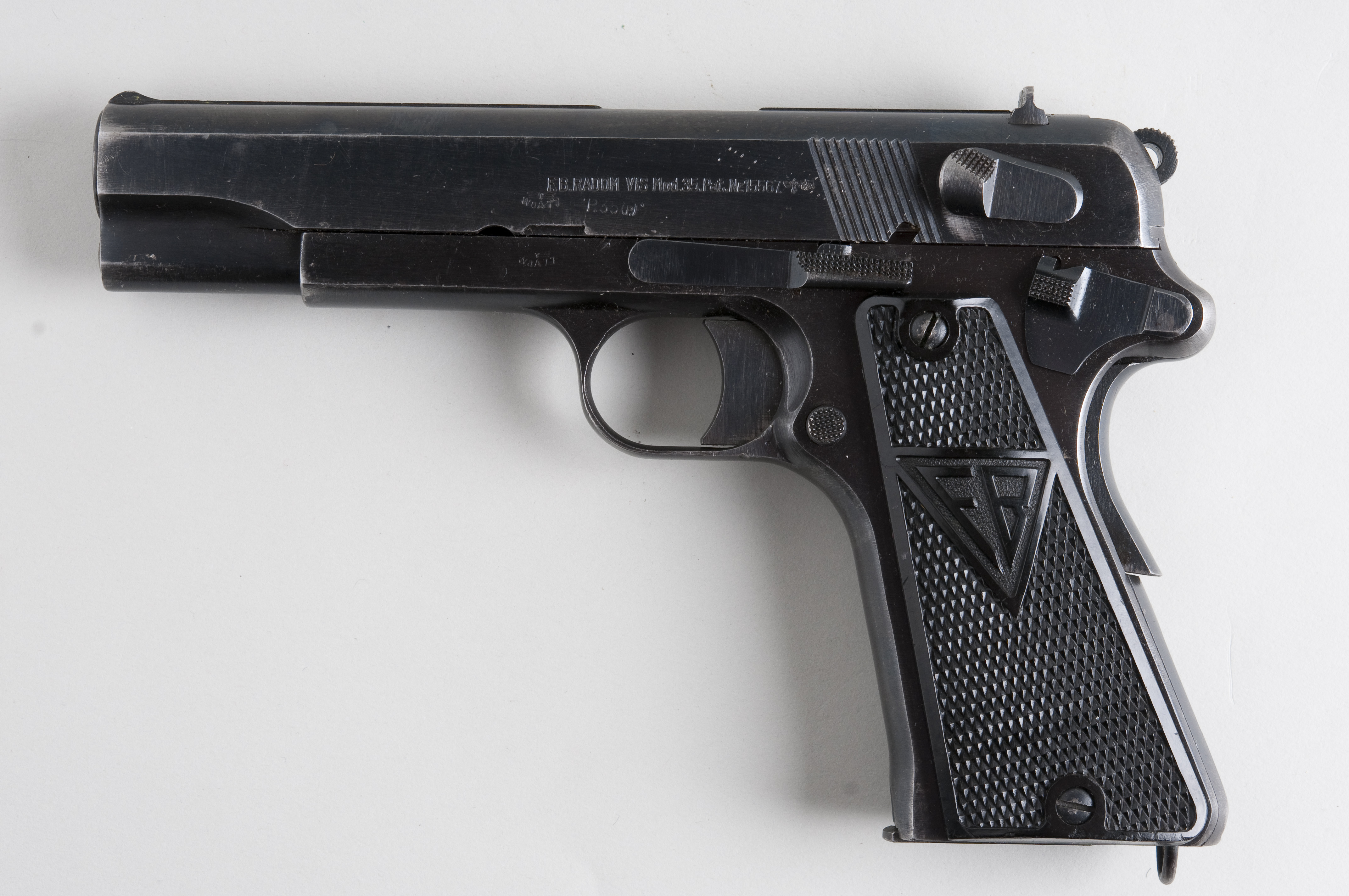 Radom From flickr user handvapensamlingen - Pistols used in Norway.